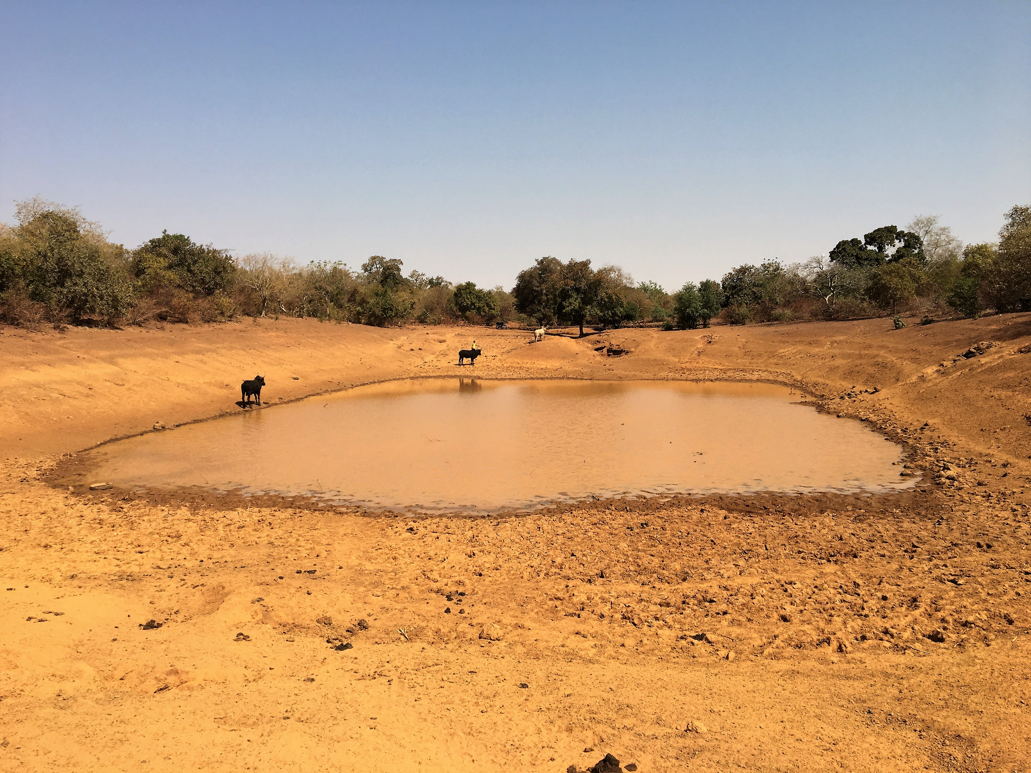 Bouli de Bogonam Mossi en février 2017